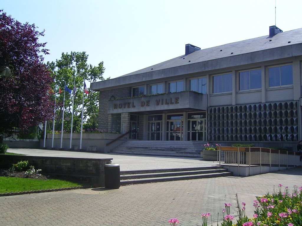 Hôtel de ville, place du Général de Gaulle Photo personnelle (own work) de Marianna